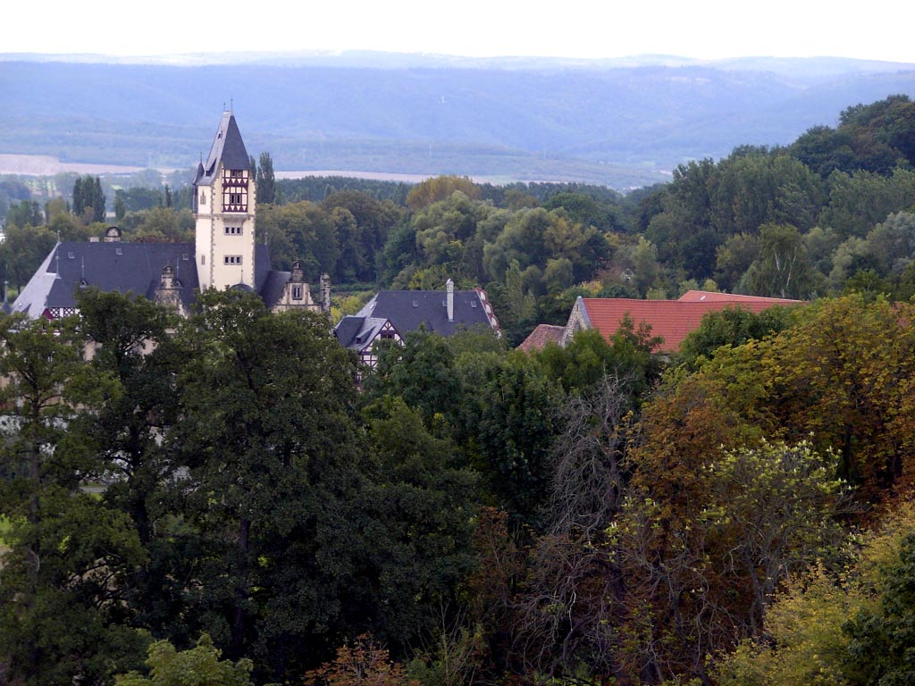 The Gartenbauschule in Quedlinburg (Germany)